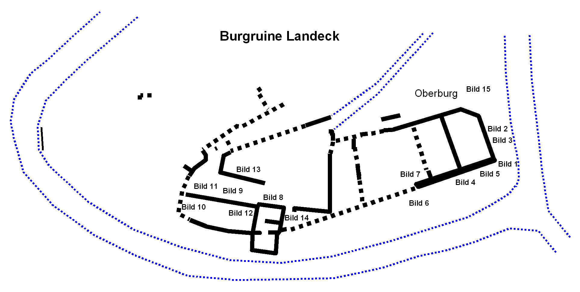 Burg Landeck Grundriß der Burgruine Landeck